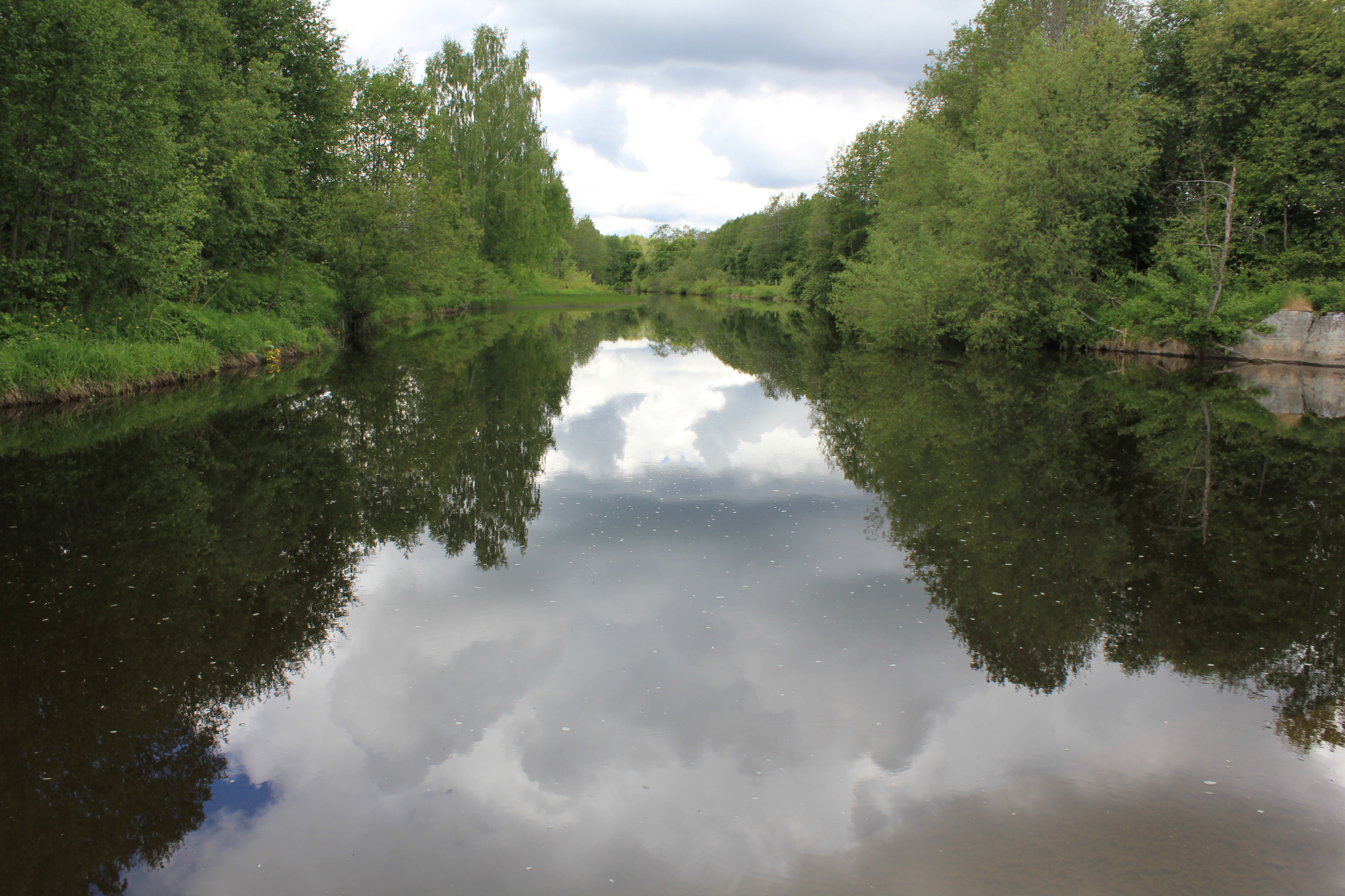 Håjendammen i Lenaelva.